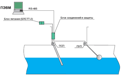 Схема рычажно-маятникового расходомера. На схеме присутствуют: лопасть скорости, лопасть уровня, Блок сбора информации, блок питания, ЭВМ